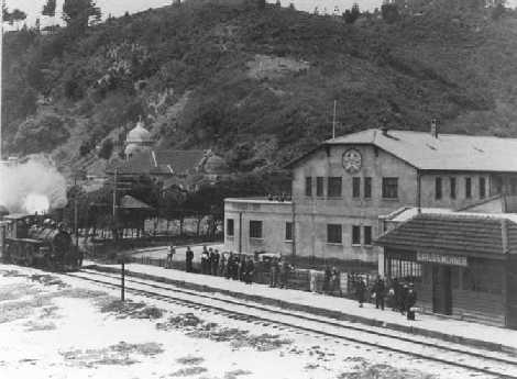 Old Train Station of Tomé (Chile). Antigua estación de trenes de Tomé, llamada "Carlos Werner". También se puede apreciar la iglesia "Cristo Rey" del sector Bellavista, con su antigua cúpula, que fue reemplazada por la actual después del terremoto de 1939.